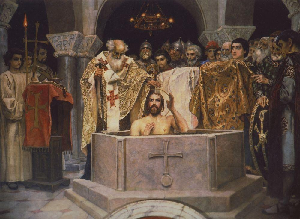 Крещение князя Владимира. Фрагмент росписи Владимирского собора в Киеве.